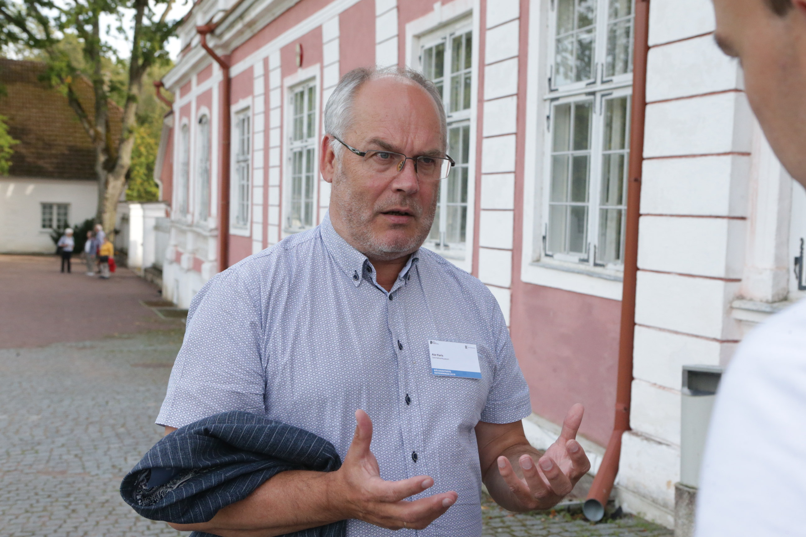 Eesti mäluasutuste suveseminar Sagadi mõisas Lääne-Virumaal pealkirjaga "Inimesed, andmed ja kratid – nende koostoimimise võimalikkusest". Eesti Rahva Muuseumi direktor Alar Karis.